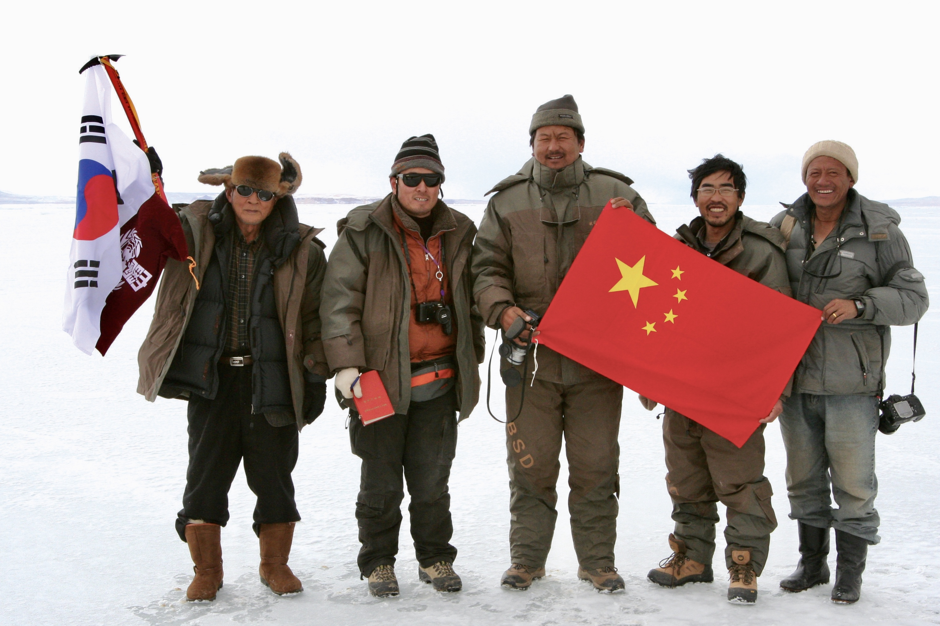 피켈에 태극기와 경희대학교 교기를 달아 높이 들었다